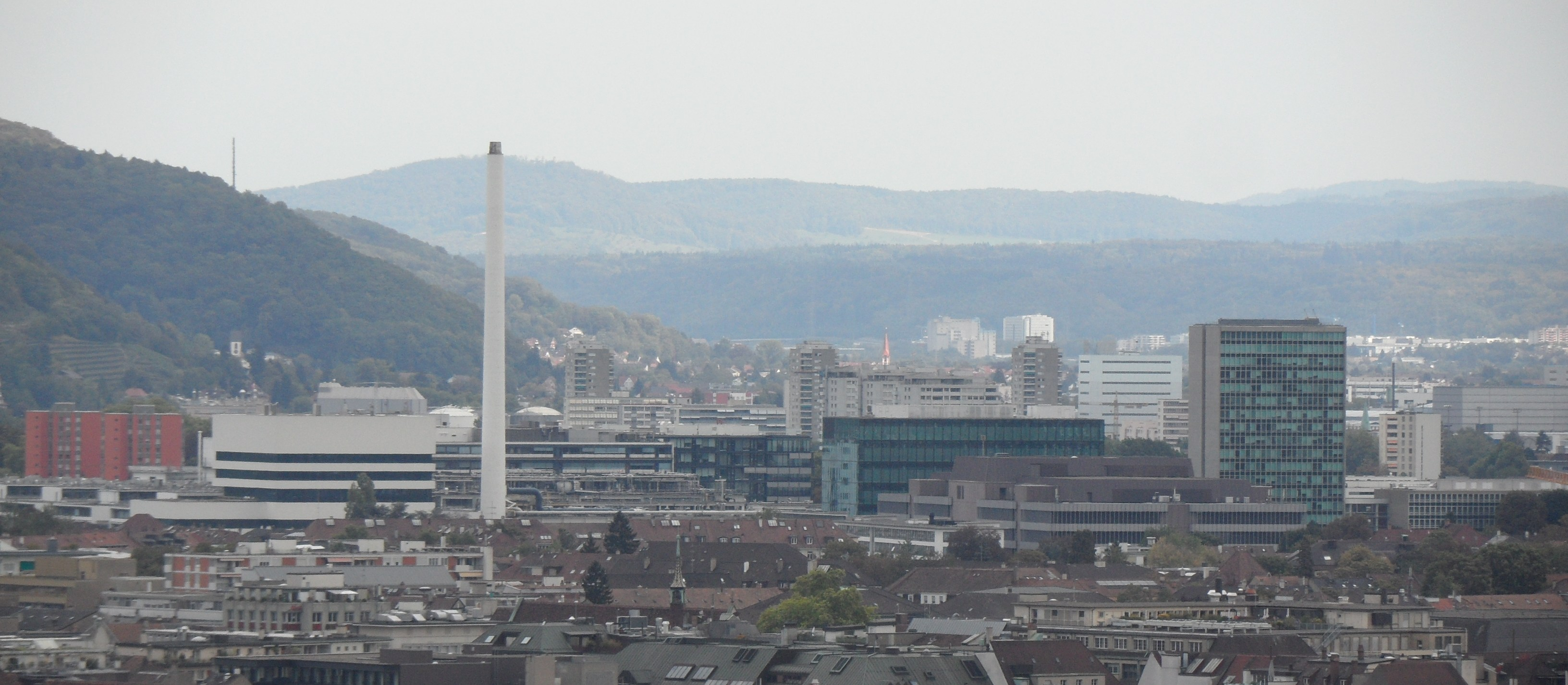 Areal der Hoffmann-La Roche in Basel